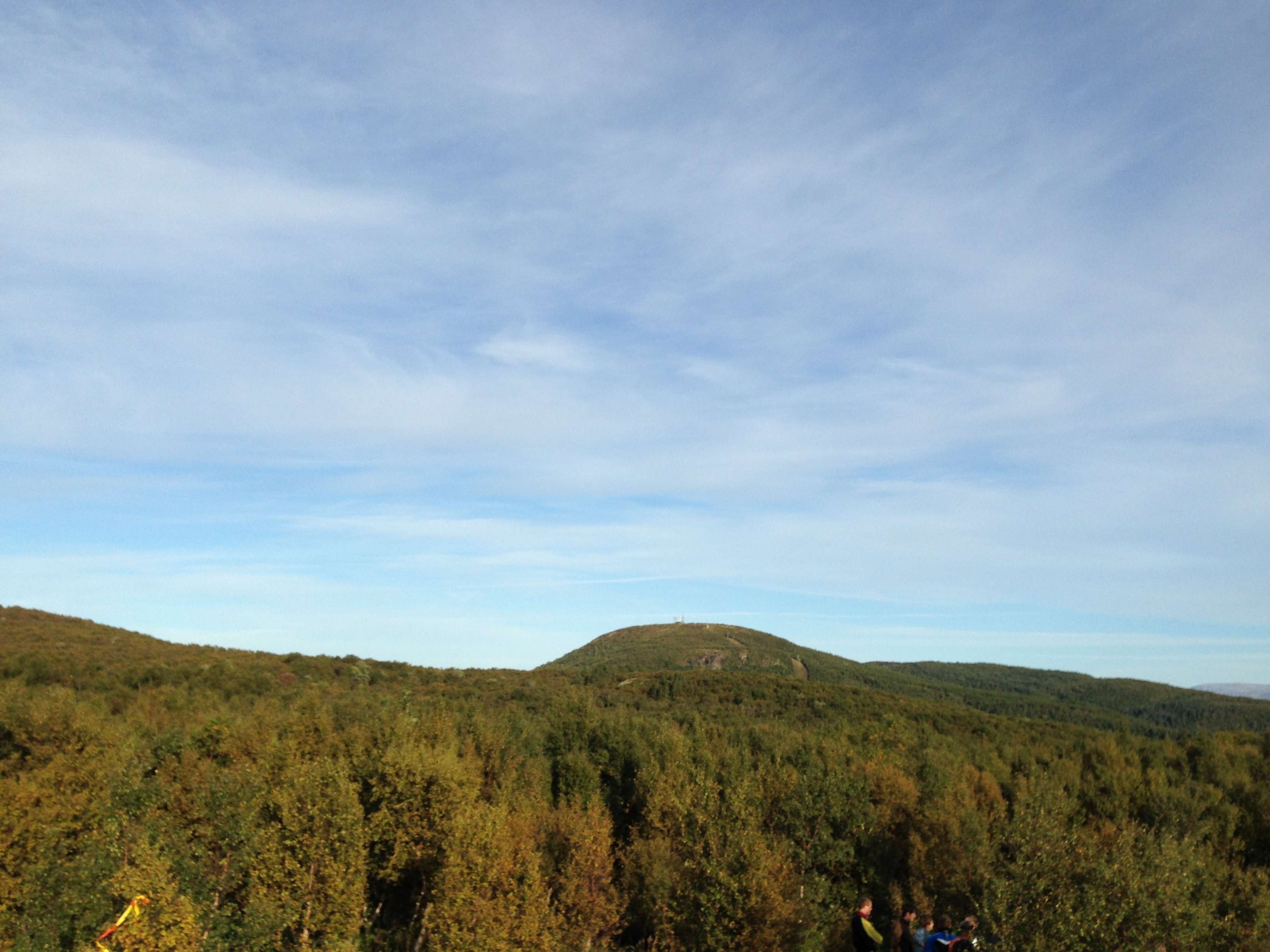 Keiservarden, et fjell i Bodømarka, sett fra Ramnfloget. 366 moh.